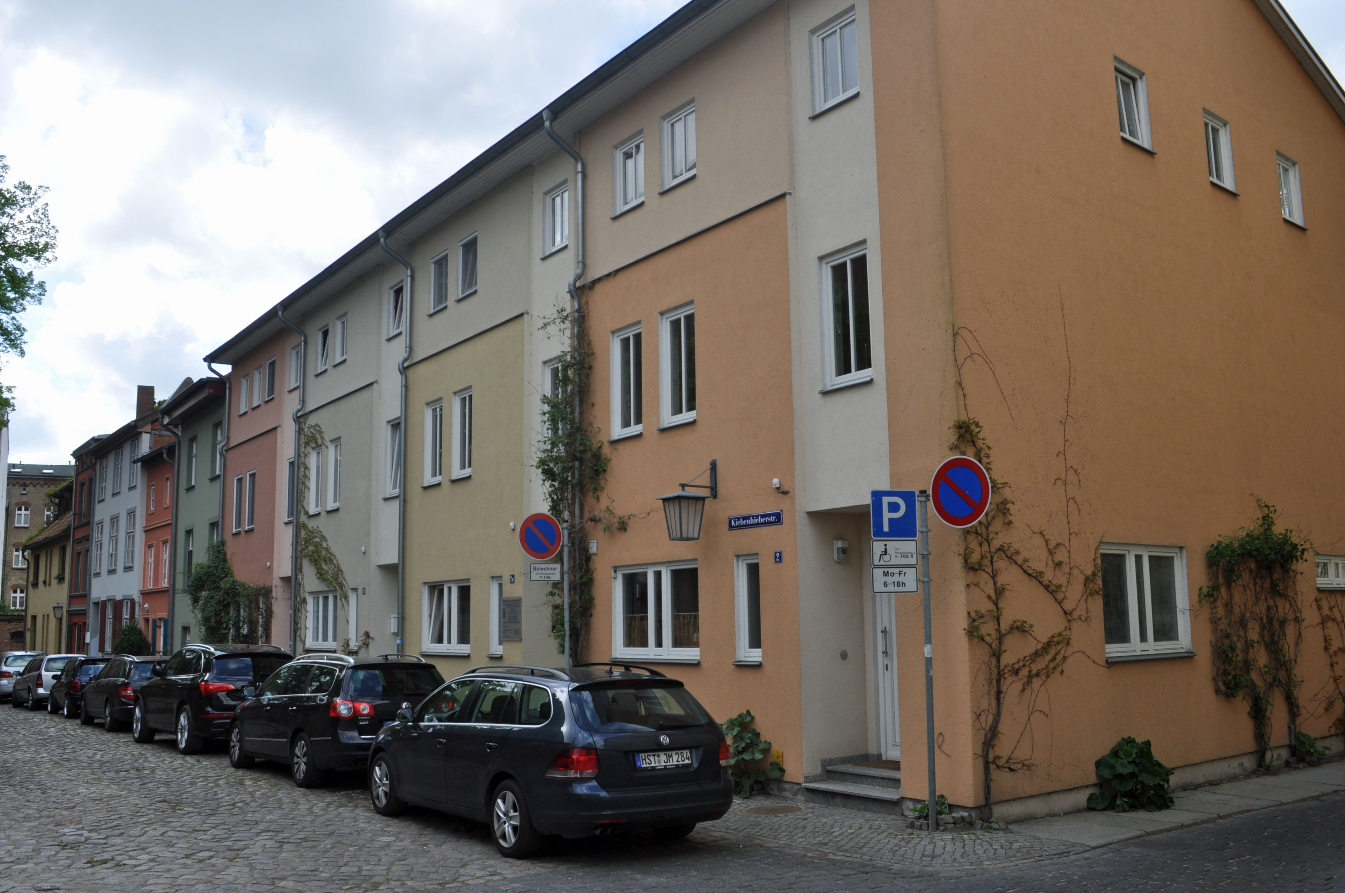 Gebäude in Stralsund, siehe Dateiname